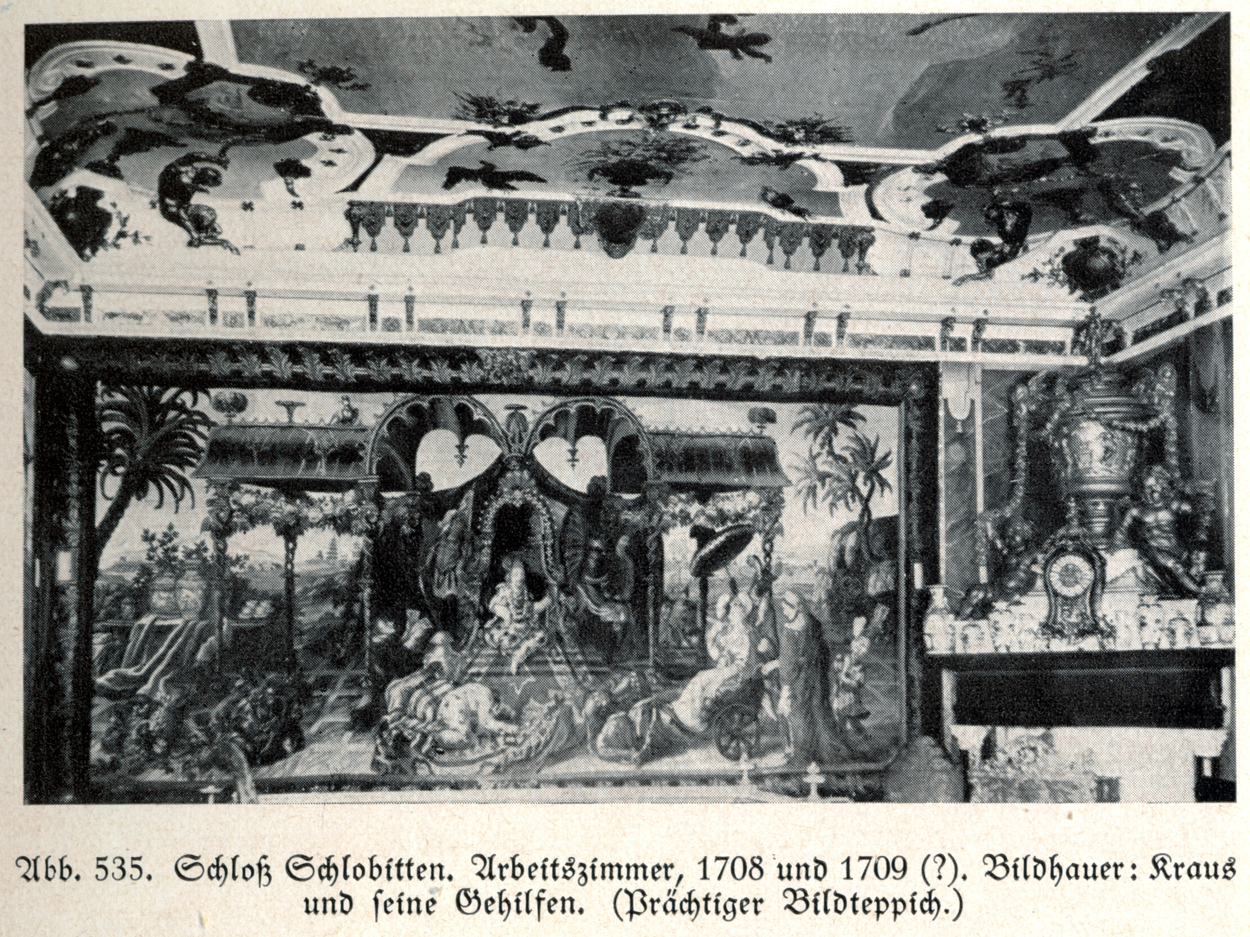 Schloss Schlobitten, Arbeitszimmer, 1708 und 1709 (?)